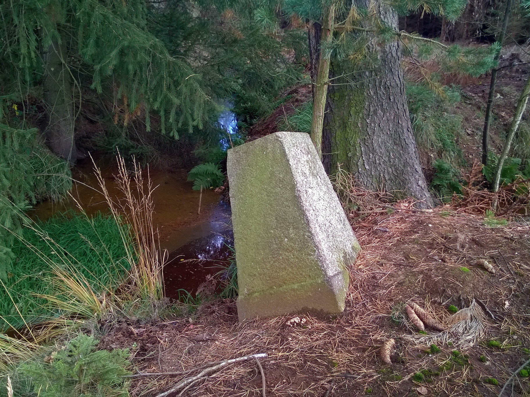 Grenzstein Nr. 106 - Historische Landesgrenze Königreich Sachsen Königreich Preußen 1815 (Wiener Kongress) Hornjoserbsce: Historiski saksko-pruski měznik čo. 106 sewjernje Jeńšec